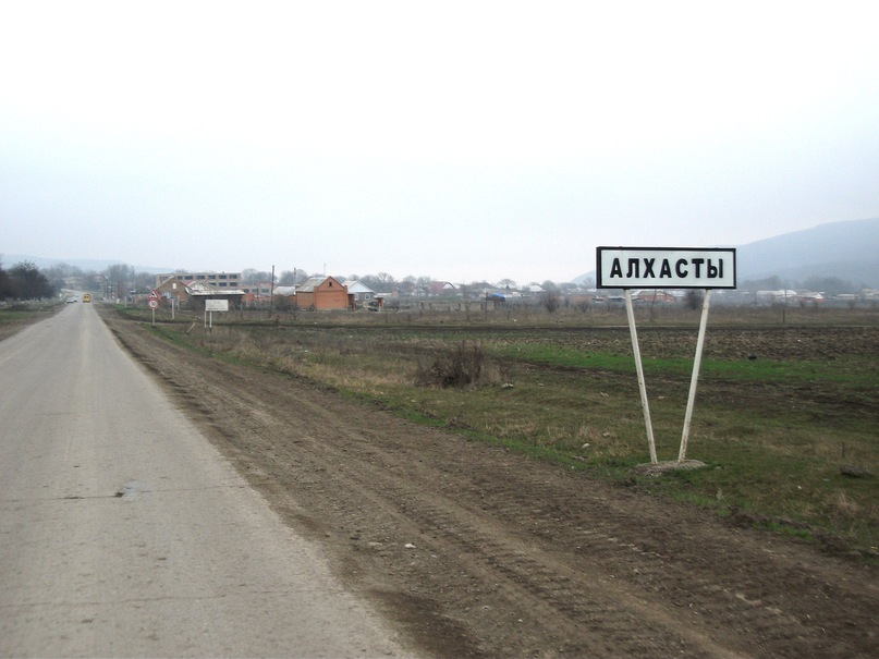 Село Алхасты (Ингушетия)